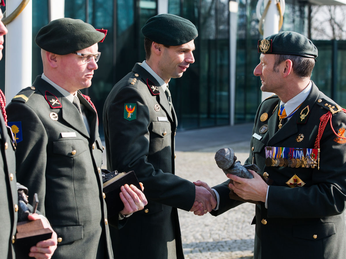 Militairen van de Koninklijke Landmacht zijn vanmiddag geëerd voor hun bijzondere inzet in Afghanistan (2007) en Syrië (2013). Op de Kromhout Kazerne in Utrecht kregen zij van Commandant Landstrijdkrachten luitenant-generaal Mart de Kruif de Sculptuur Operationeel Optreden met een Zilveren Erekoord. Er werden negen sculpturen uitgereikt. De 9 hebben zich tijdens operationeel optreden onderscheiden door 'buitengewone toewijding en loffelijk optreden'. Het gaat om 8 militairen die in Afghanistan dienden en 1 in Syrië als VN-waarnemer. "Zij hebben maandenlang gewaakt over de veiligheid van collega’s en bondgenoten", aldus De Kruif. "Ze hebben zich gewaagd in de vuurlinie en op het cruciale moment gehandeld." Vol trots namen de militairen het beeld en de bijbehorende versierselen in ontvangst.